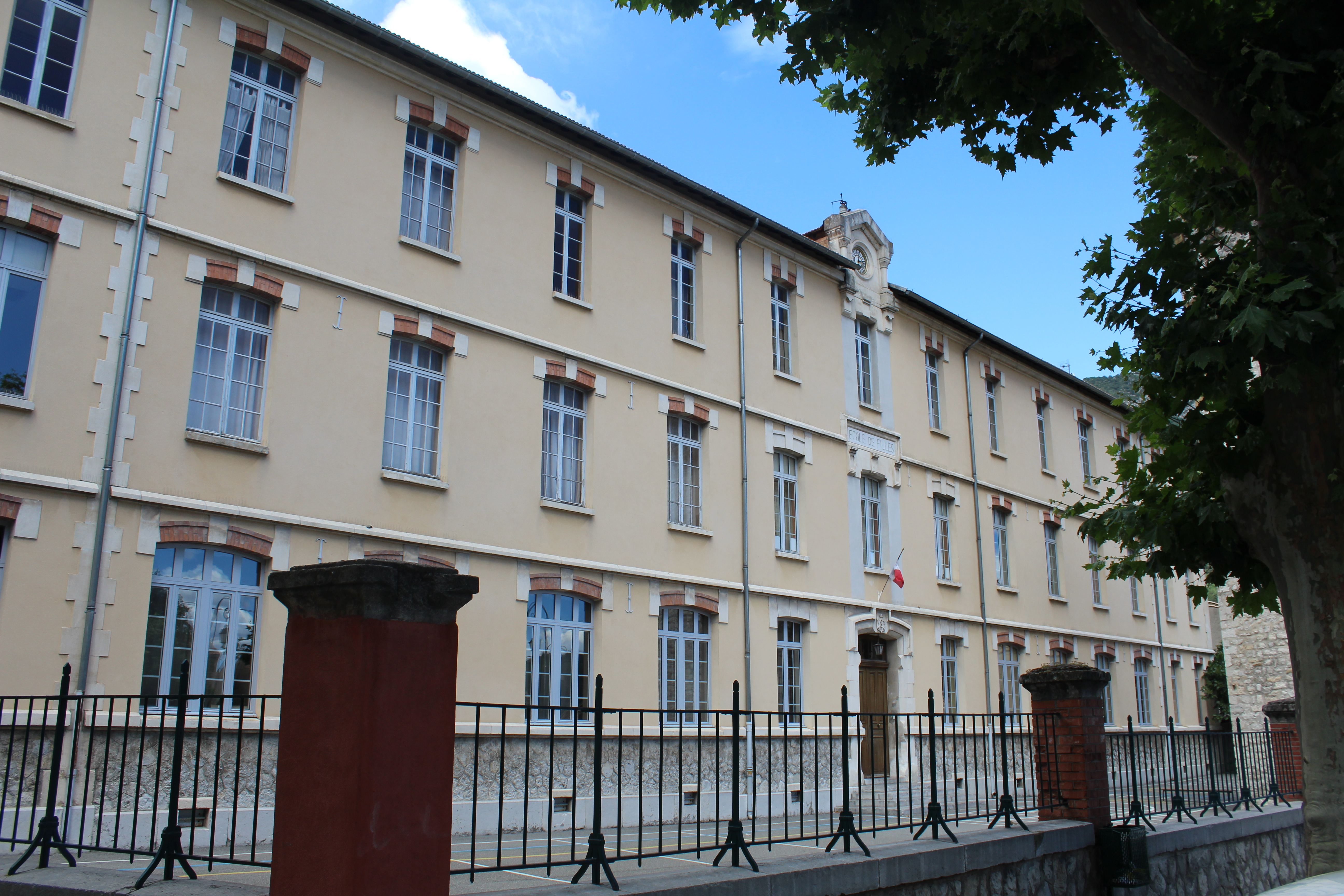 École de Verdun, Sisteron.